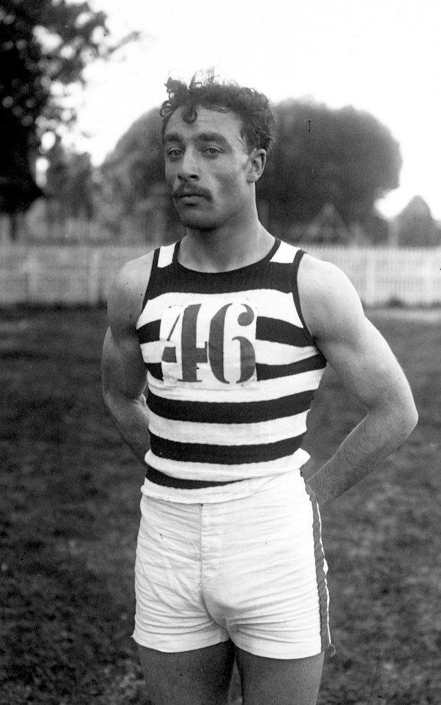 Lelong [champion de France USFSA du 400 mètres, 16-6-12] : [photographie de presse] / [Agence Rol]